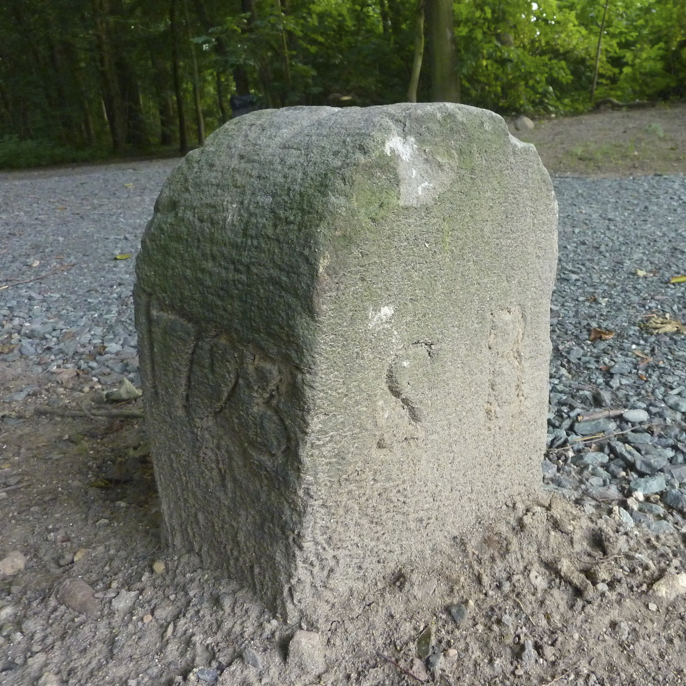 Frankfurt am Main, Stadtteile Bockenheim/Rödelheim: Grenzstein des 18. Jahrhunderts am Westrand des Biegwaldes. Die Beschriftungen lauten: an der Nordwestseite „SR“ (Solms-Rödelheim), an der Nordostseite die Jahreszahl 1723, an der Südostseite „HH“ (Hanau), an der Südwestseite „N7“